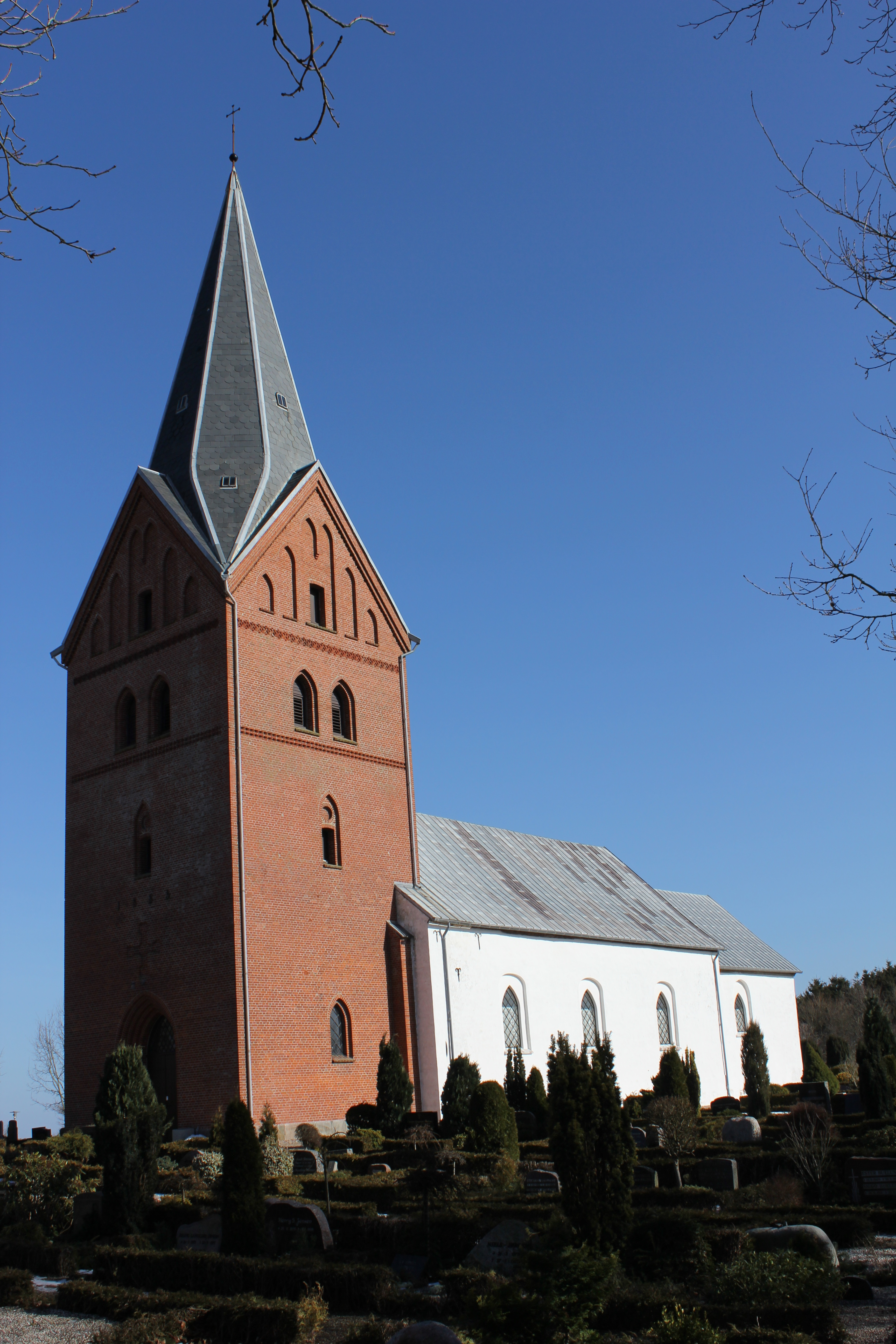 Sindbjerg Kirke i Sindbjerg Sogn nord for Vejle.